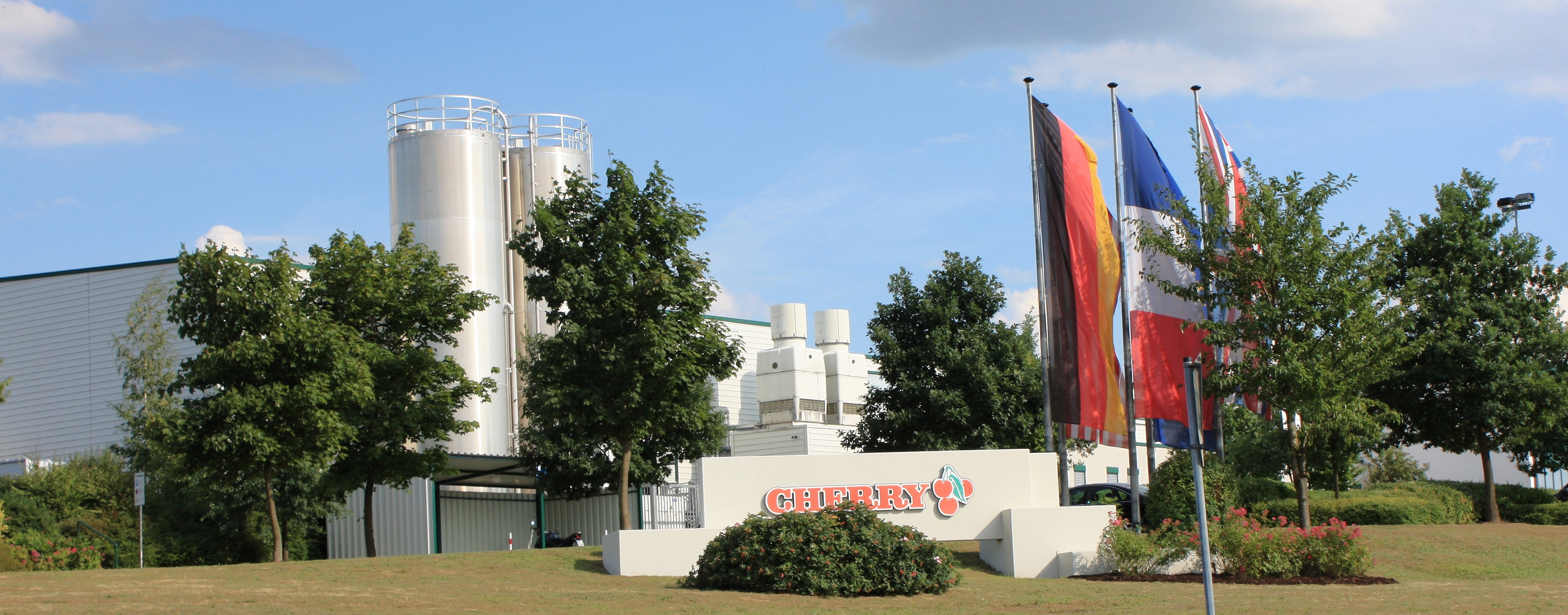 Werk Bayreuth (Ortsteil Wolfsbach) der Firma Cherry